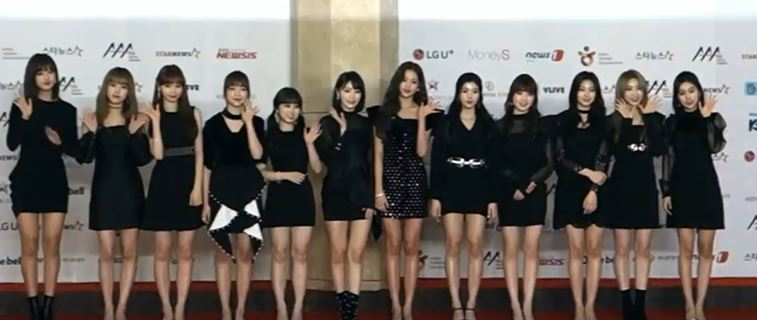 28일 오후 인천광역시 중구 영종도 파라다이스시티 아트스페이스플라자에서 '2018 Asia Artist Awards(2018 아시아 아티스트 어워즈) 식전 레드카펫 행사가 열렸다. 'AAA'는 한해동안 아시아와 대한민국을 빛낸 K-Pop, K-Drama, K-Moive를 결합해 수상자를 선정하는 시상식으로 '2018 AAA'에는 방탄소년단, 트와이스, 워너원, 선미, 갓세븐, 더보이즈, 마마무, 모모랜드, 몬스타엑스, 세븐틴, 스트레이키즈, 아이즈원, (여자)아이들, 지코, AOA, 배우 이병헌, 하정우, 윤아, 배수지, 이지은(아이유), 주지훈, 박해진, 김설현, 김다미, 김명수, 김용지, 류이호, 성훈, 이다희, 아승가, 장기용, 정해인, 진영, 차은우, 최민호, 최태준 등 글로벌 스타들이 총출동한다.